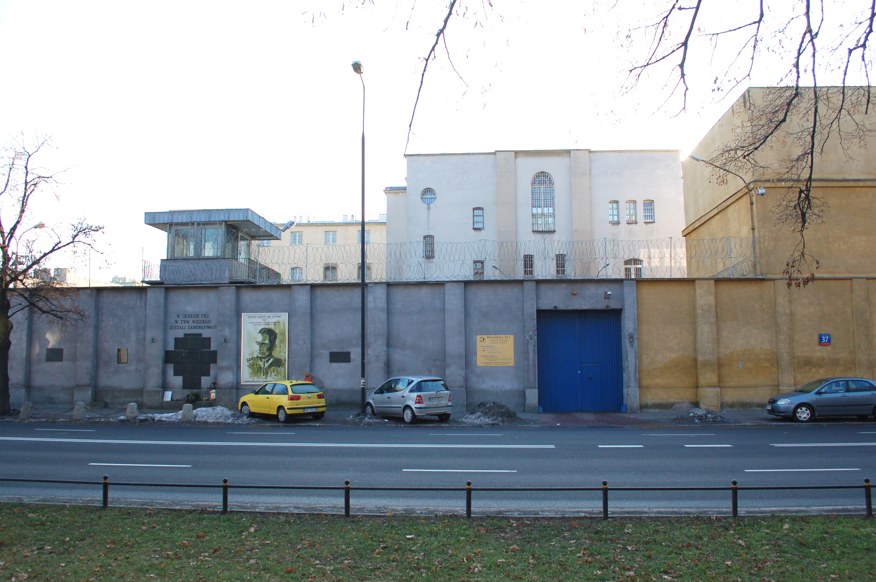 Mokotów Prison